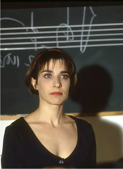 חגית דסברג בסרט גולם במעגל